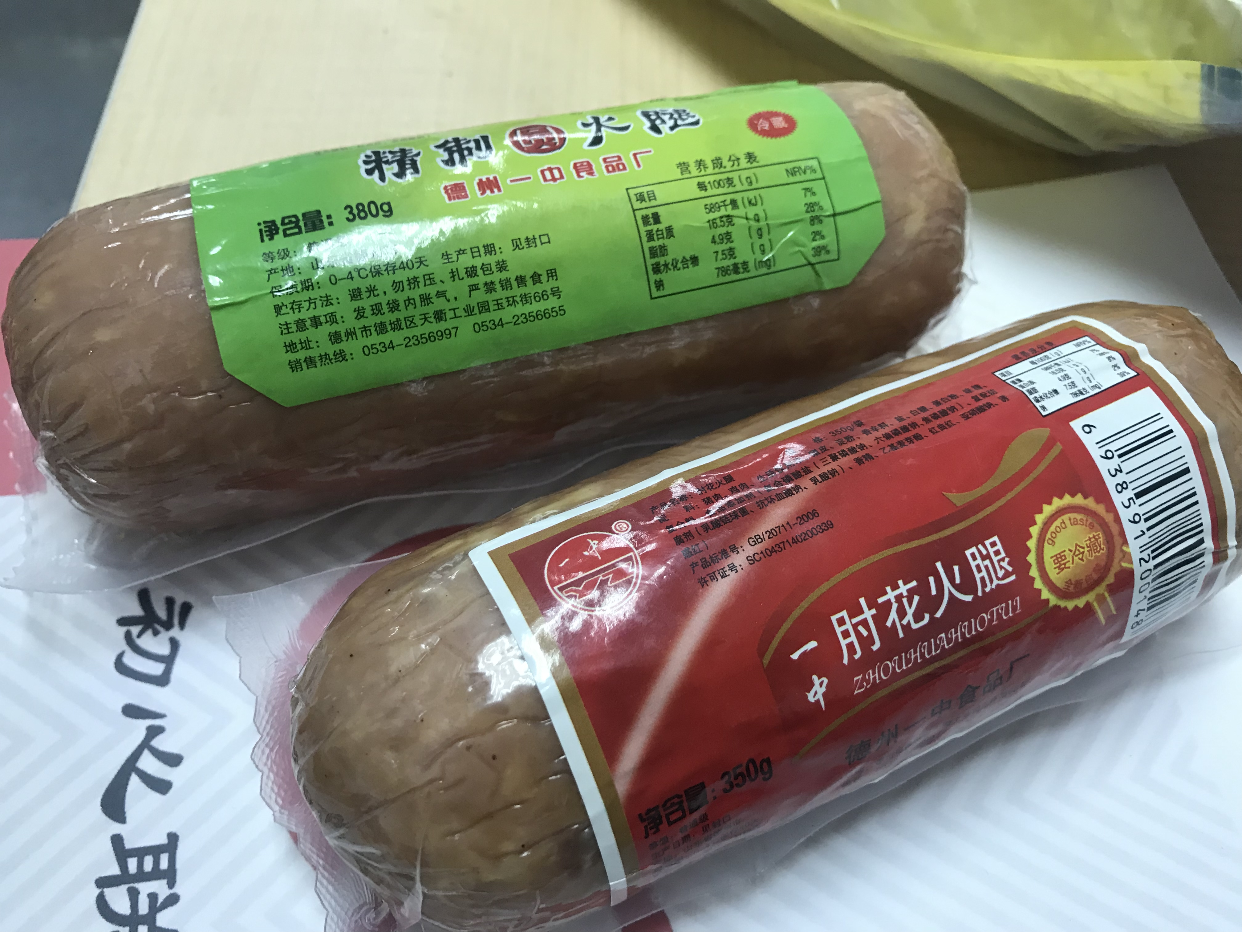 一中火腿。山东省德州市德州一中食品厂出产的火腿产品。